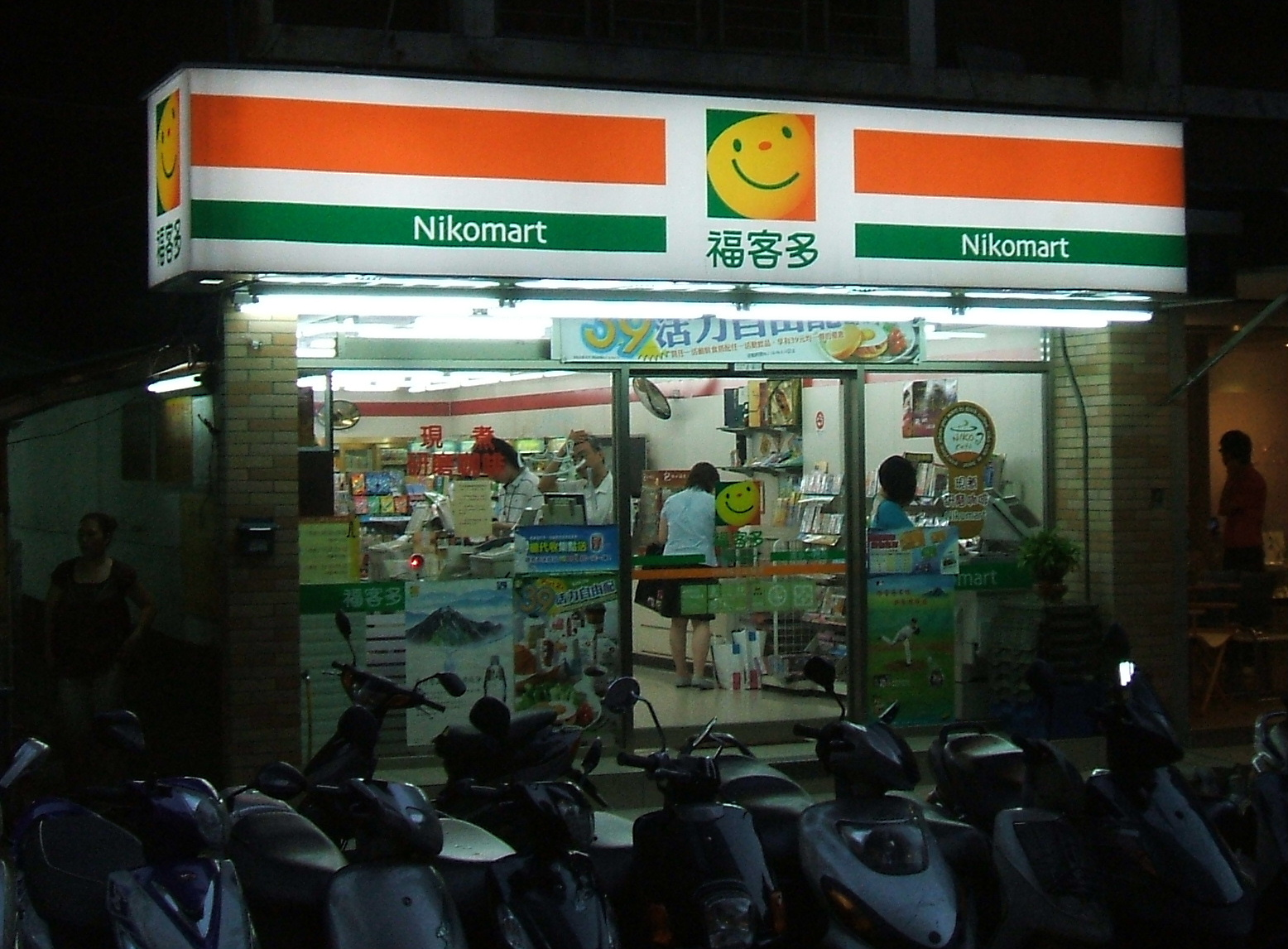 中文（台灣）: 台湾台北市中山区で撮影。台湾のコンビニエンスストア「福客多商店」(ニコマート)かつては日本国内でも展開されていた。